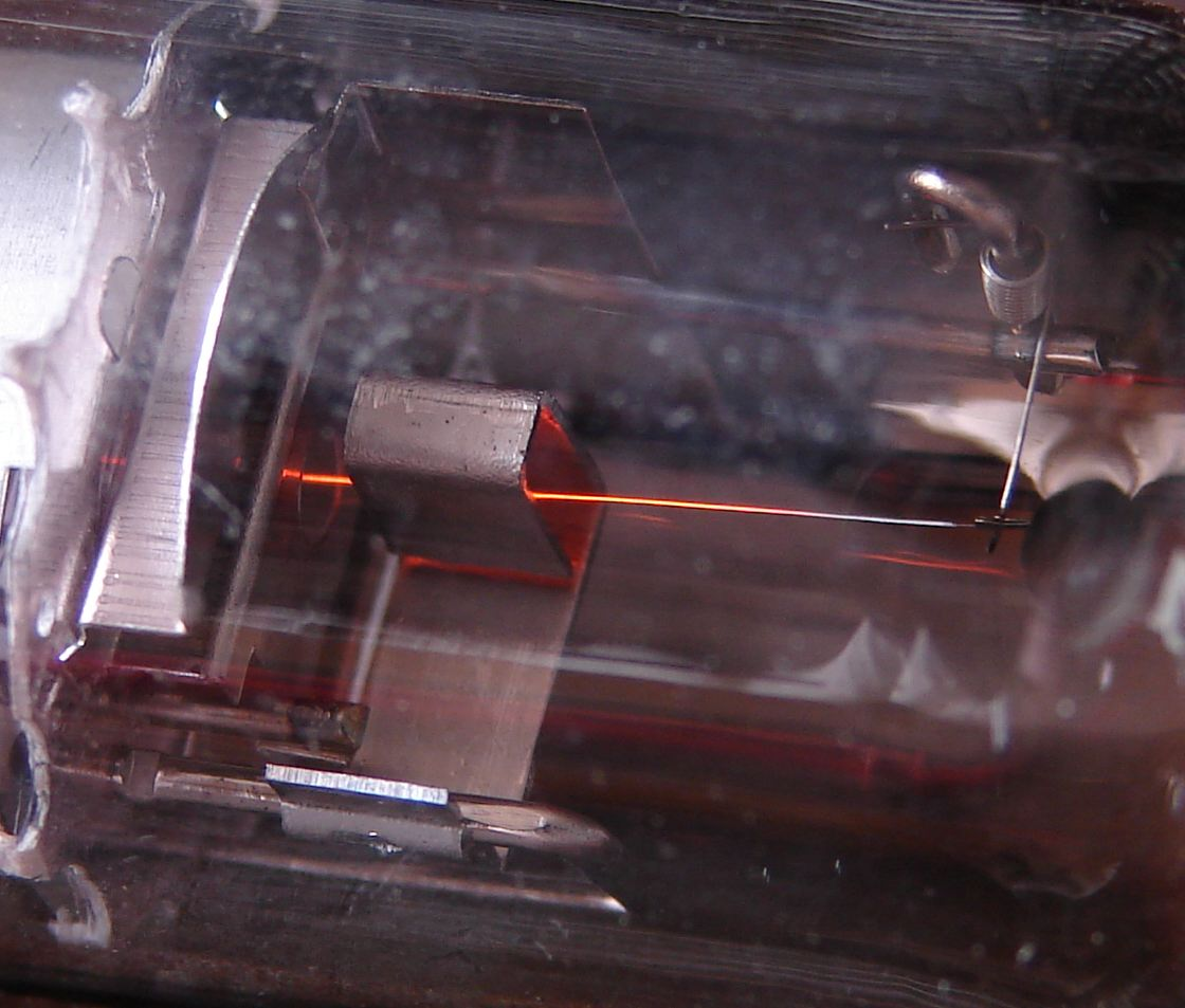 Beispielansicht direkte Röhrenheizung anhand DAF96